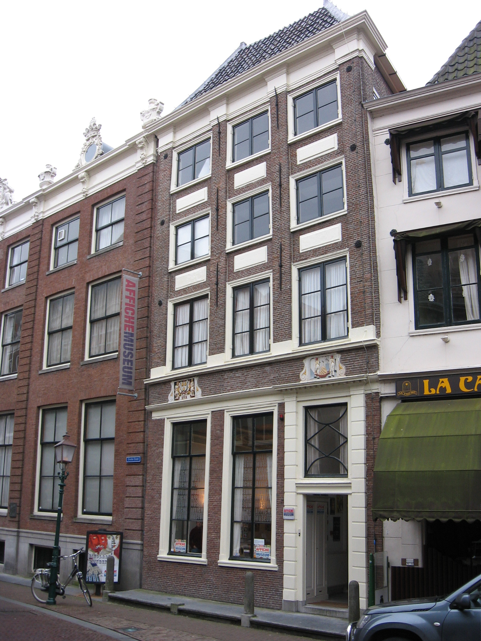 Hoorn, dec 2006.